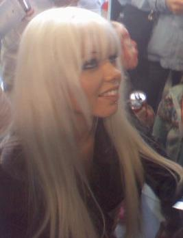 Kerli signing a demo CD at Legacy Mazda in Orem, Utah.